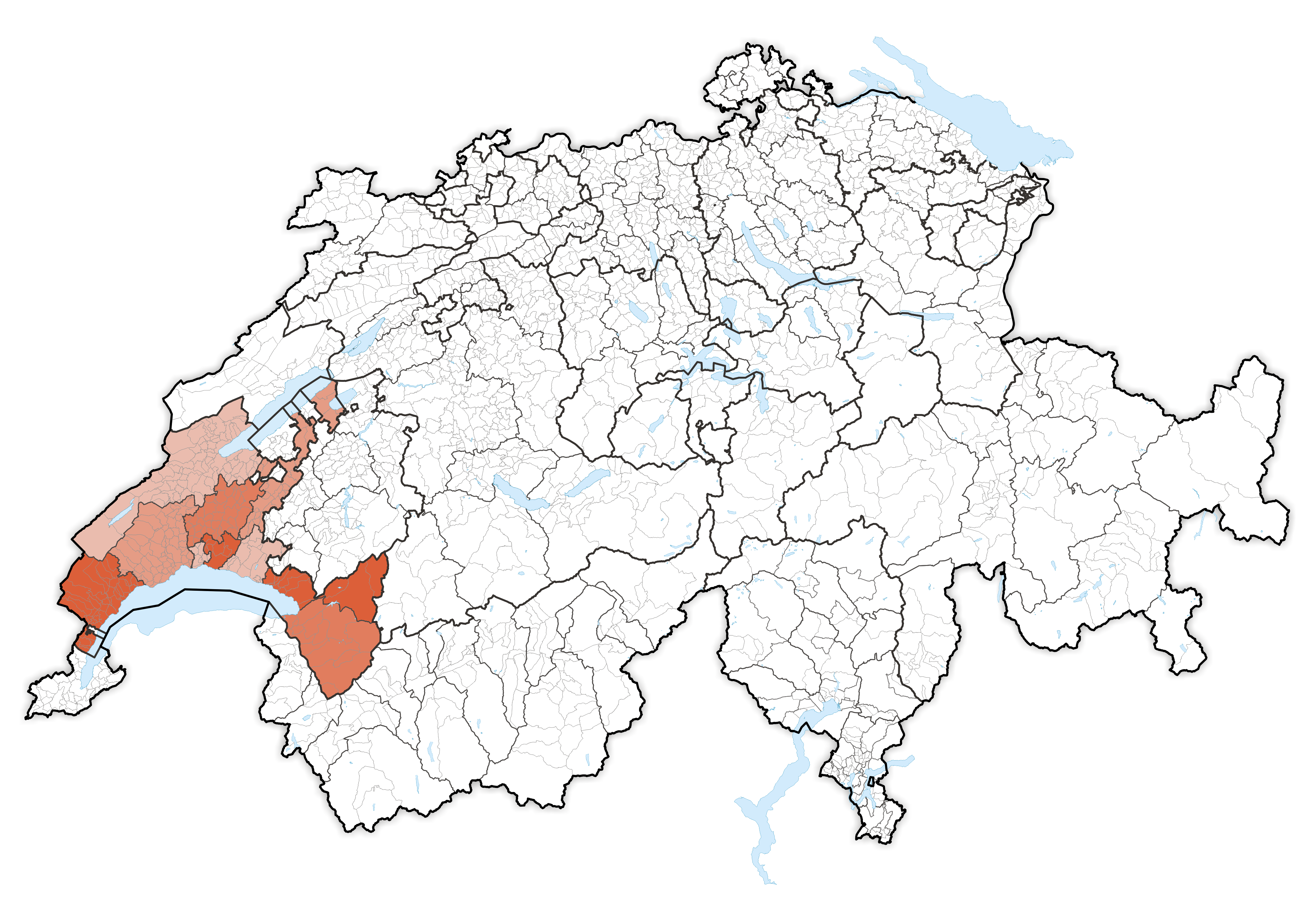 Canton Waadt